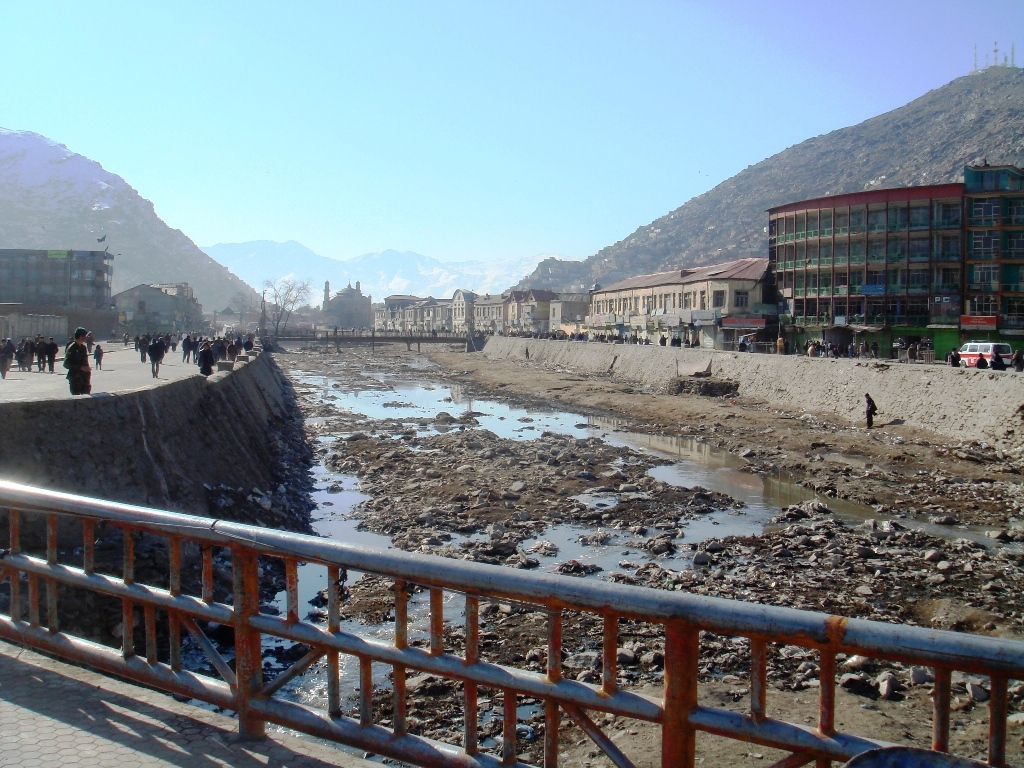 DRY Kabul River